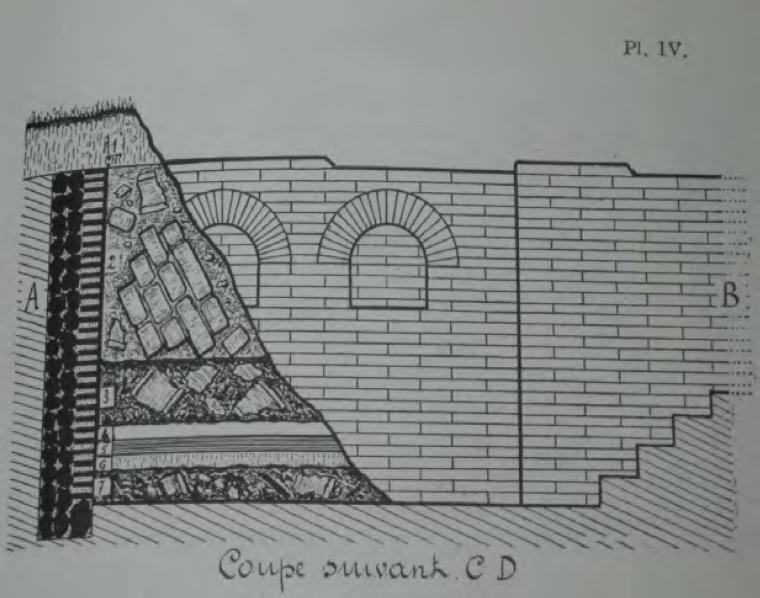 Foto van een afbeelding uit een boek waarin de Gallo-Romeinse kelder van een villa wordt beschreven.